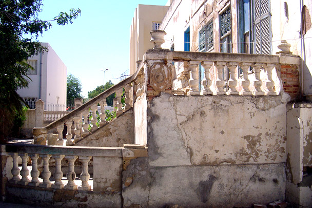 Perron - Etat Eté 2006 Photographie de l'auteur